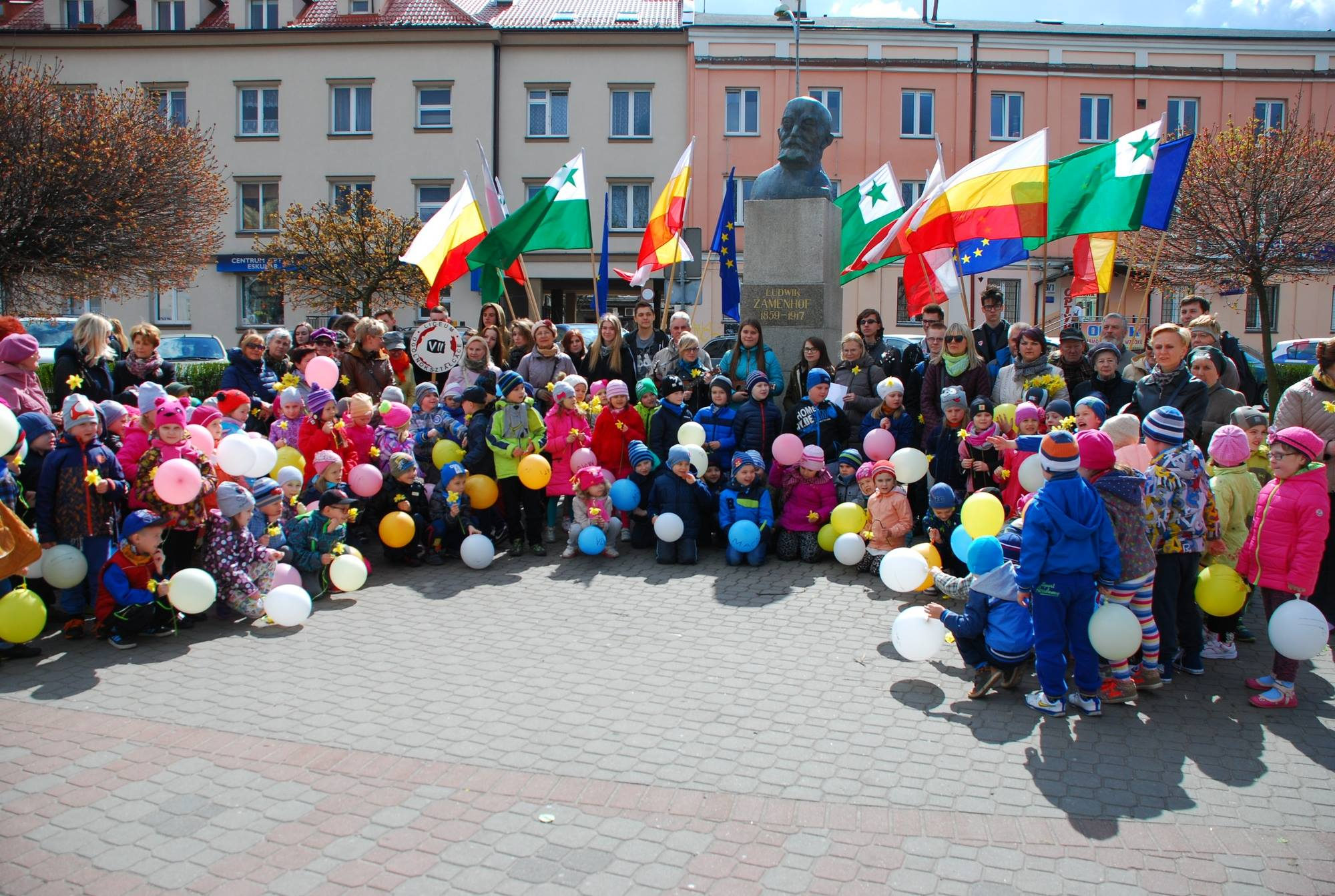 Renkontiĝo ĉe Zamenhof-monumento okaze de la datreveno de lia morto